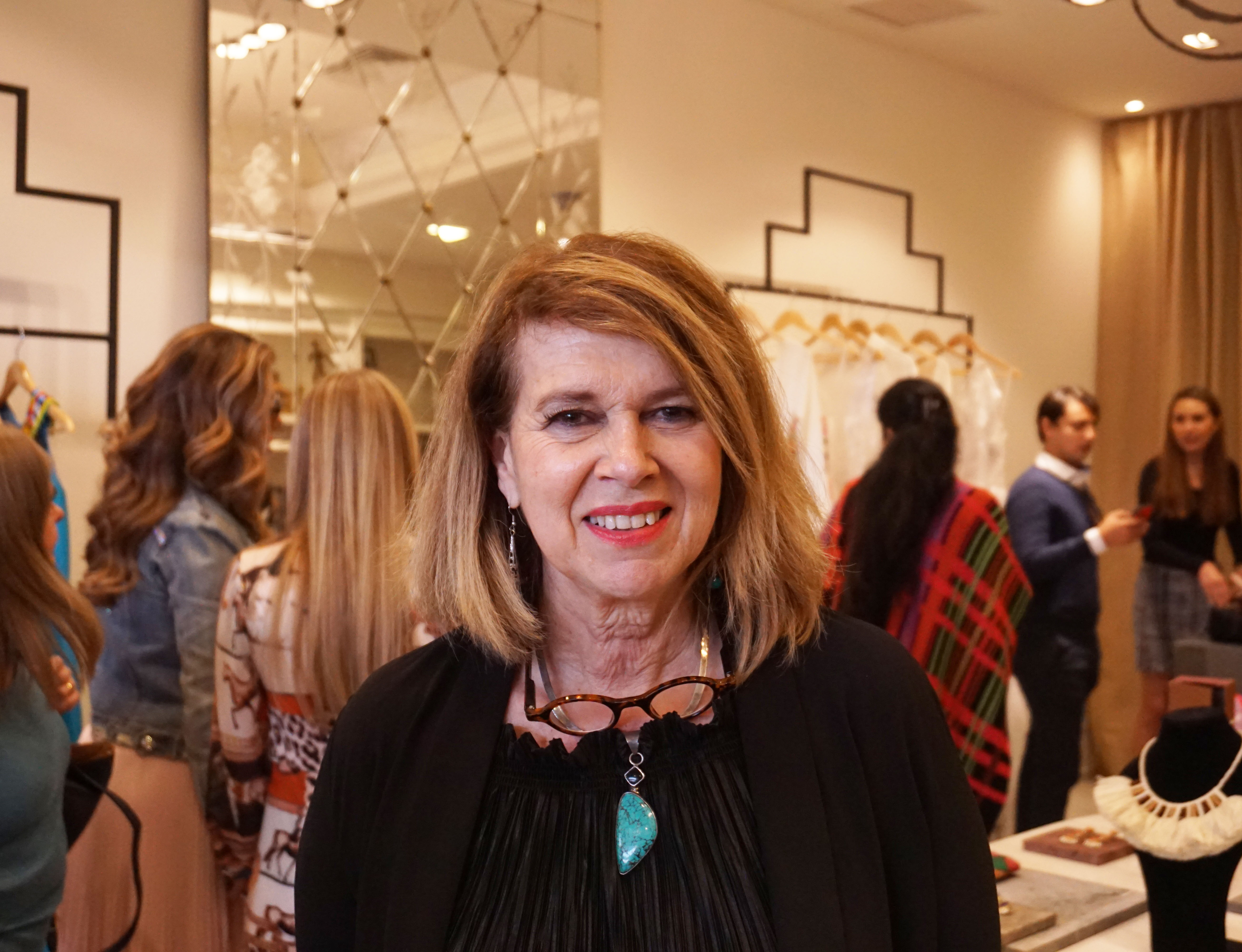 La diseñadora Lydia Lavín en la inauguración de su boutique en el centro comercial Park Plaza en Santa Fe, el martes 30 de octubre de 2018. Ciudad de México, México.